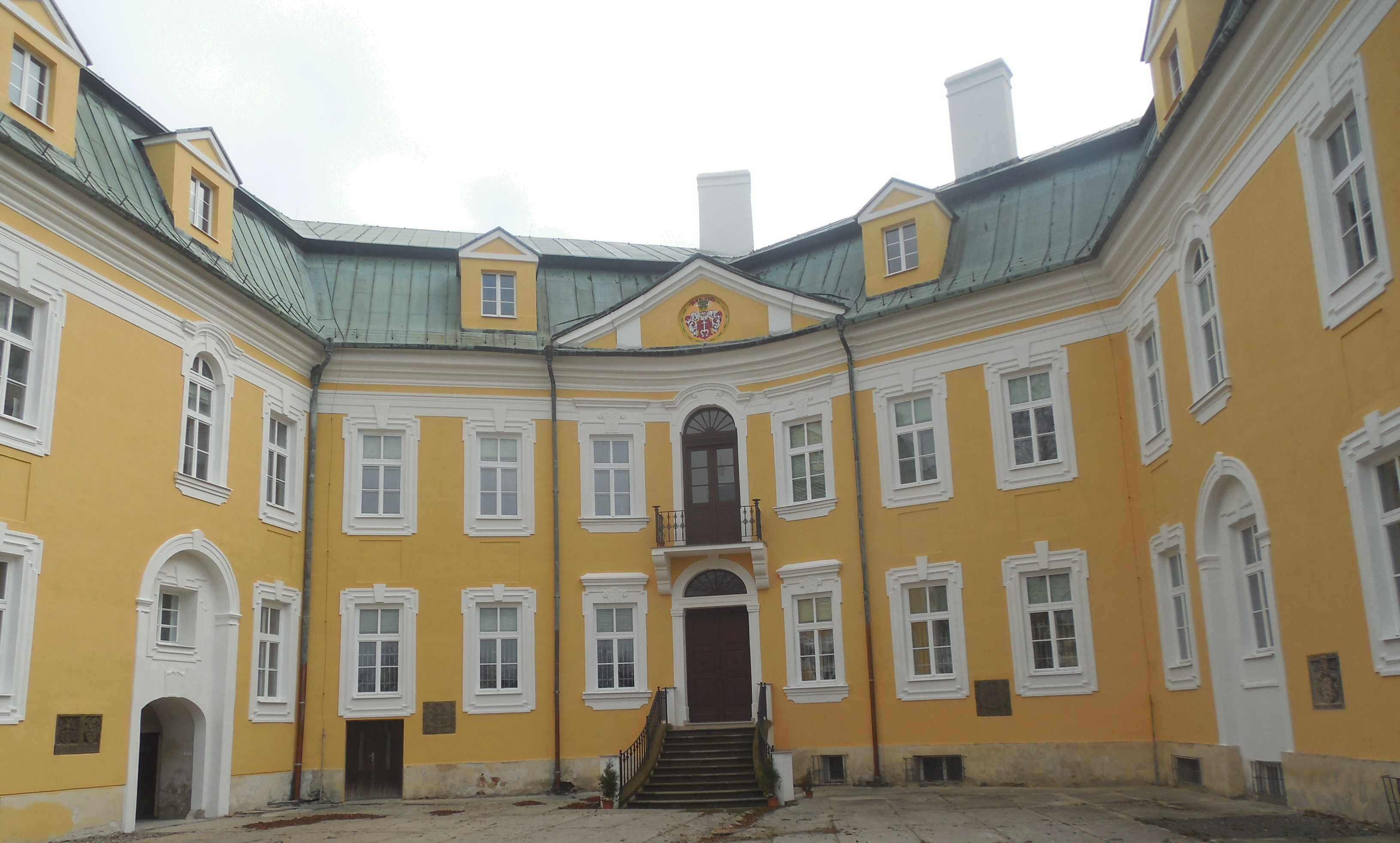 Zámek tvořící dominantu města Bílovce patří k hodnotným renesančním architekturám 16. století. Bílovecký zámek je dvoupatrová trojkřídlá budova na půdorysu nepravidelného „U“ s okrouhlými nárožními rondely, krytá mansardovou střechou. Zásadní stavební úpravy zámku realizoval Bernard Pražma z Bílkova společně se svojí manželkou Christinou z Lappitz v letech 1575-76. Václav Karel Sedlnitzky z Choltitz dal roku 1736 celý zámek přestavět v barokním slohu. Bylo strženo severní tzv. křídlo a tím dostala budova otevřenou dispozici, kterou má v podstatě podnes. Jeden z nejhorších požárů zachvátil zámek na samém konci druhé světové války. Později v budově zámku sídlilo Městské muzeum v Bílovci a Krajský ústav národního zdraví v Ostravě. Nyní je zámek znovu otevřen. Na zámku se konají výstavy, divadelní festivaly, koncerty, šermířská vystoupení. Jsou zde vystaven stál expozice rodu Sedlnických z Choltic, historie zámku, instalovaný apartmán hraběnky Idy Sedlnitzké,výstava zaměřená na lov a myslivost v proměnách doby.